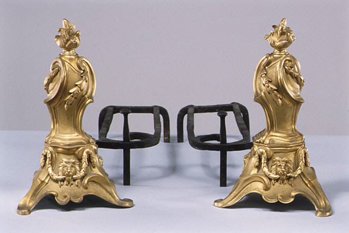 French; Andirons; Metalwork-Gilt Bronze